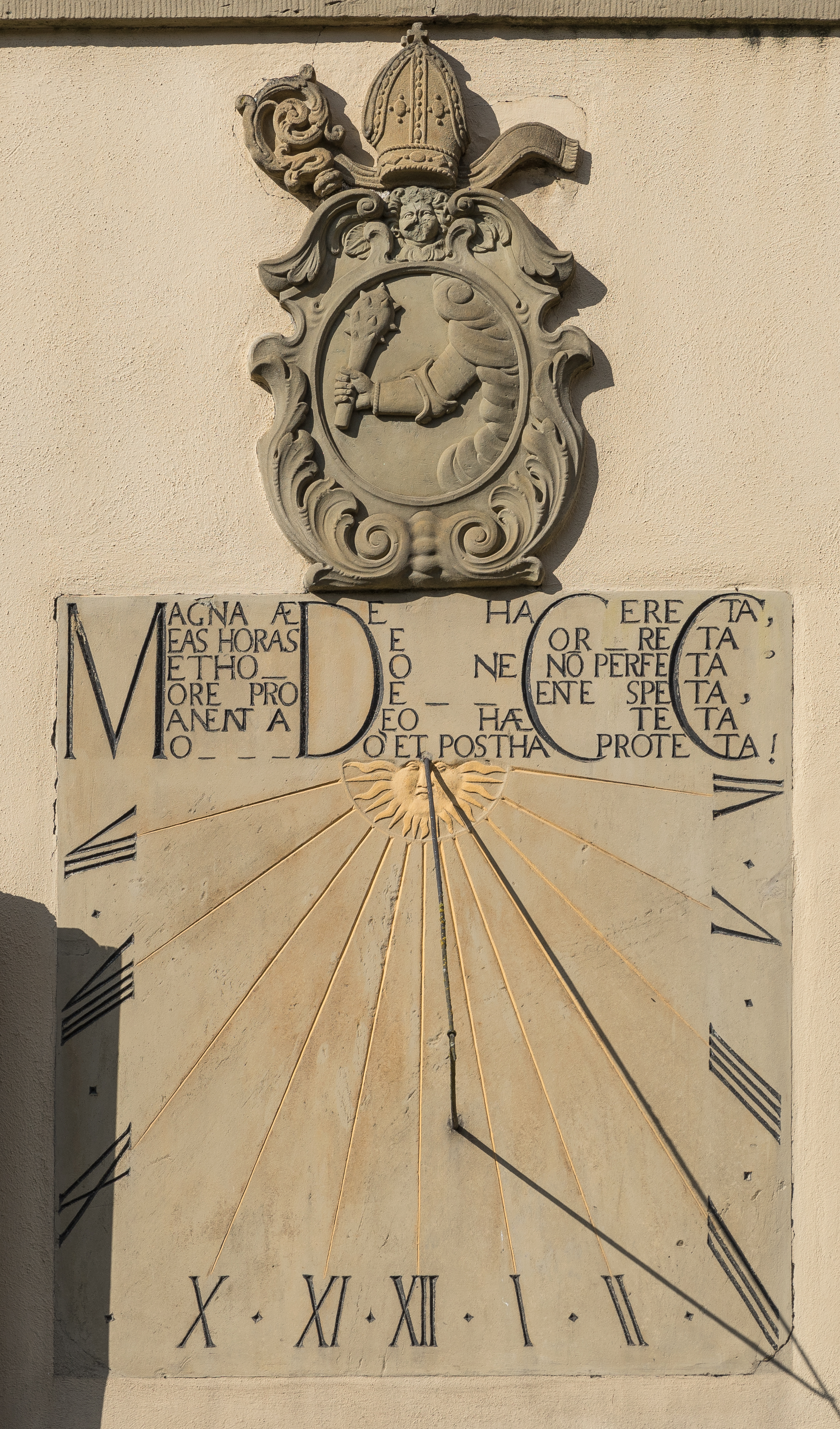 Kloster Schöntal (Hohenlohekreis): Sonnenuhr an der Südfassade des Offiziantenbaus (heute Klosterapotheke). Die Sonnenuhr wurde gemäß Chronogramm MDCC = 1700 von Abt Benedikt Knittel gestaltet (daher sein Wappen über der Uhr).